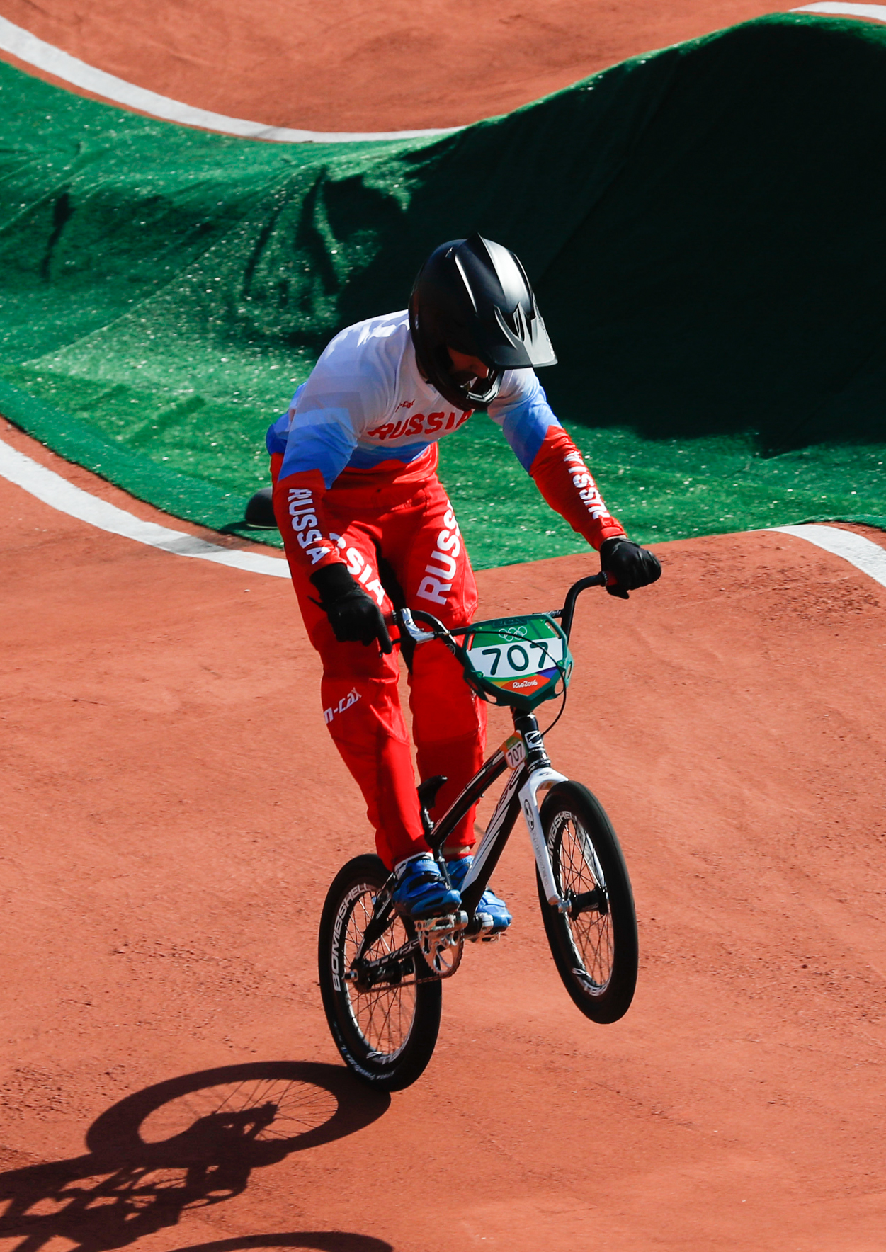 Rio de Janeiro - Ciclista russo Evgeny Komarov compete BMX nos Jogos Olímpicos Rio 2016, no Parque Radical em Deodoro (Fernando Frazão/Agência Brasil)